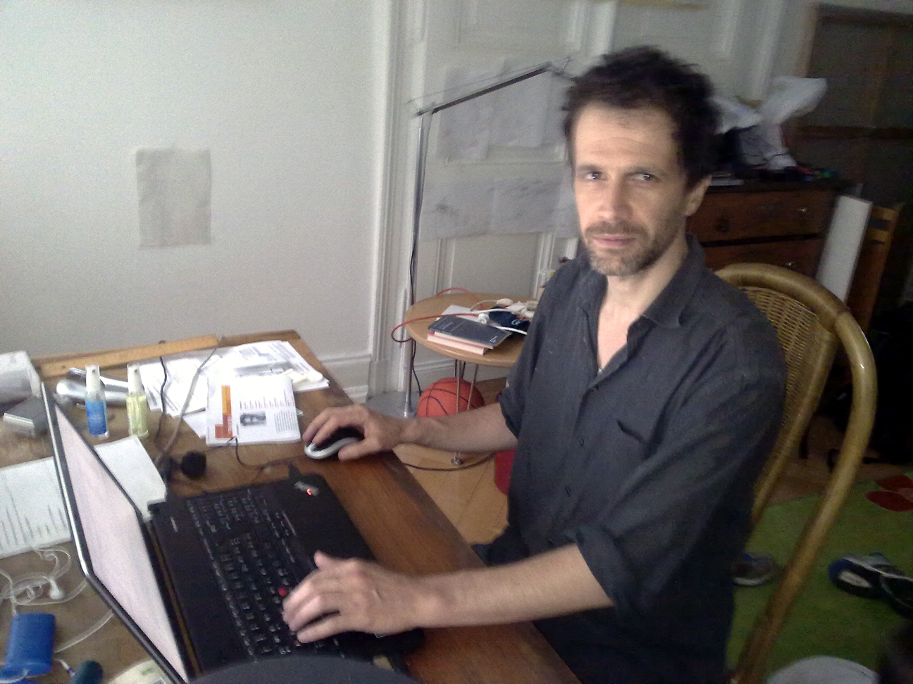 Lothar Kittstein an seinem Schreibtisch in Bonn (Juli 2014)